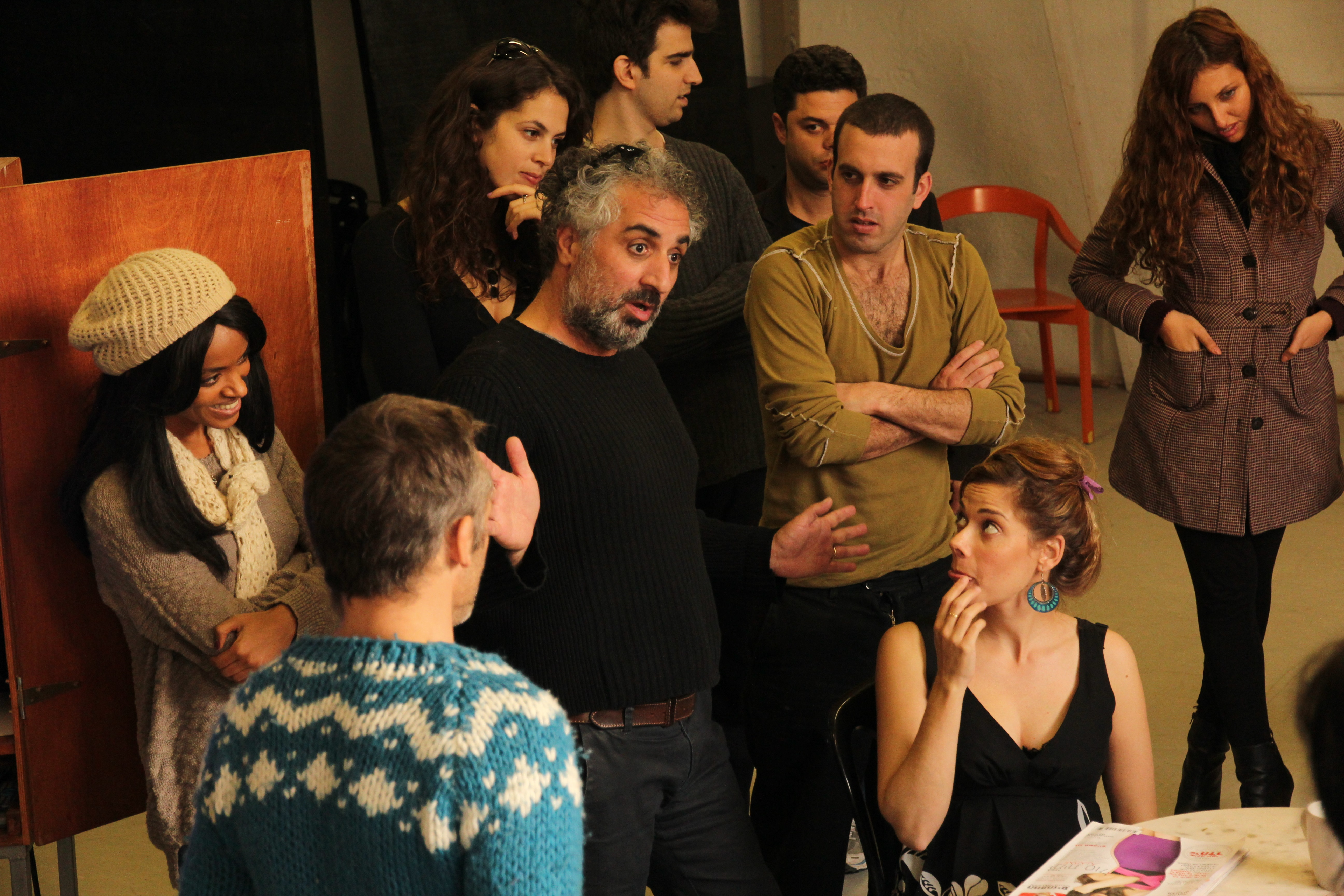 משחק מול מצלמה דובר קוסאשוילי